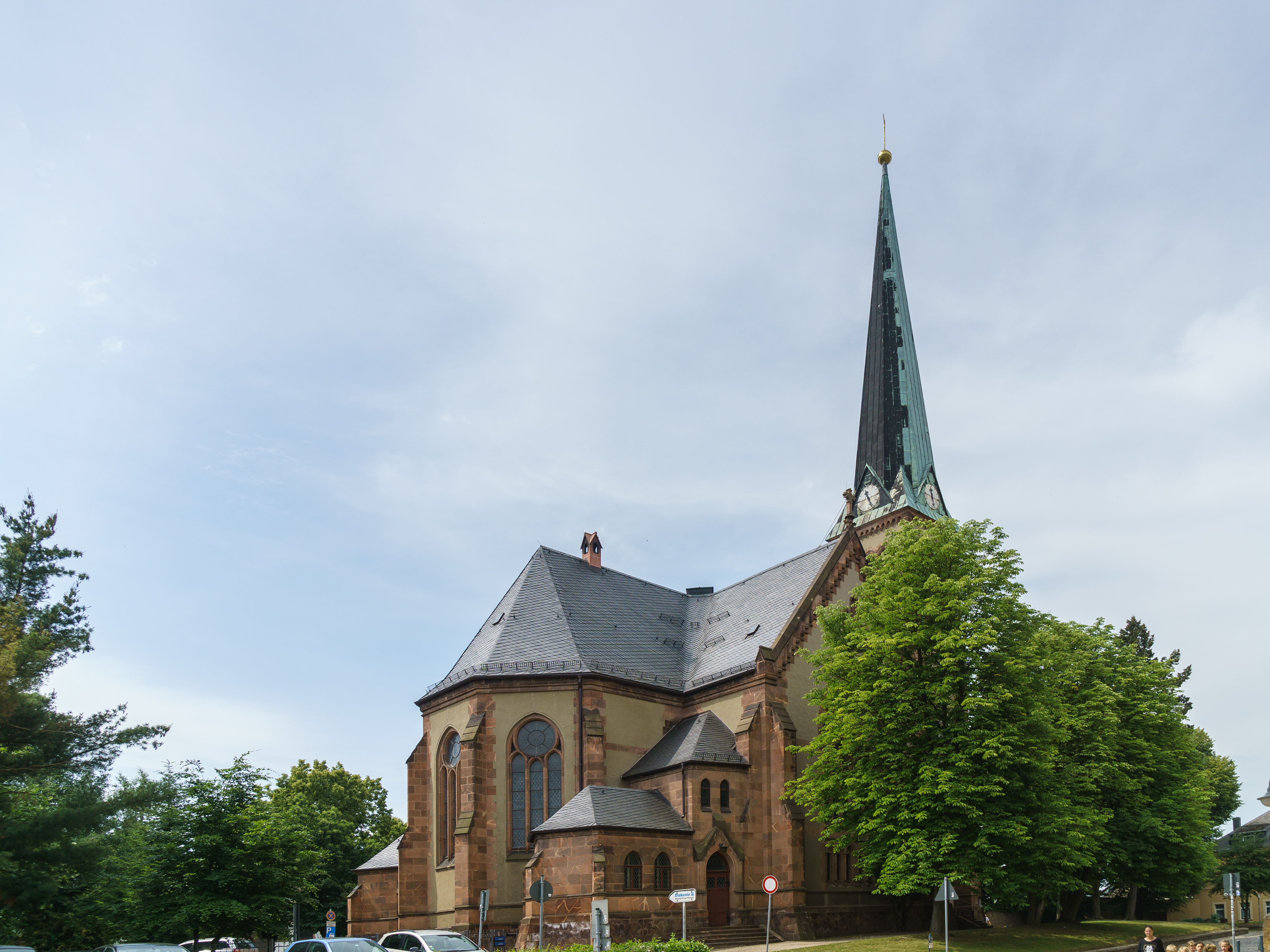 Martin-Luther-Kirche, Lutherplatz in Geringswalde